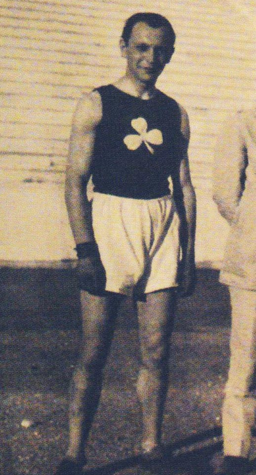 Ο Απόστολος Νικολαΐδης το 1919 στο Παναθηναϊκό Στάδιο